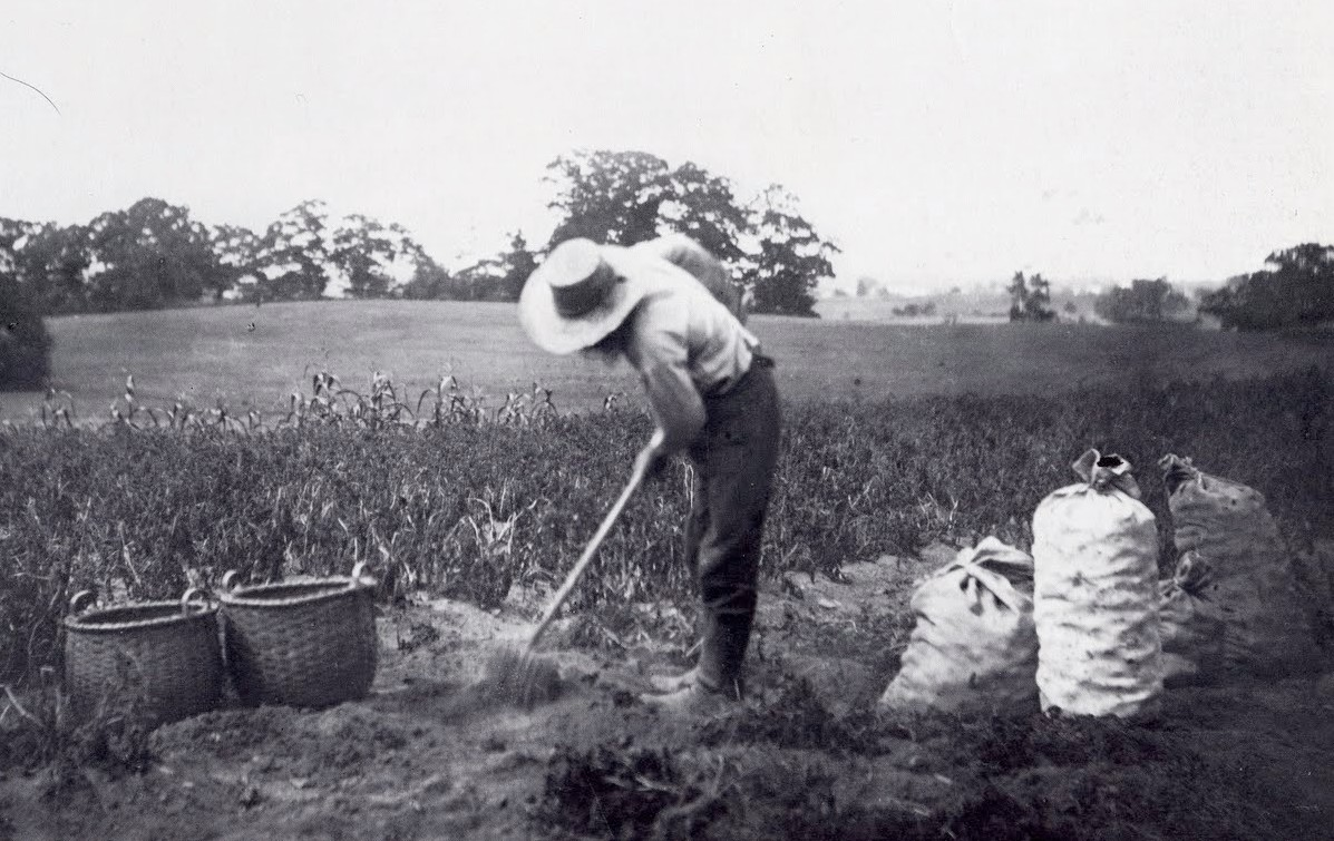 Photographie anonyme de la récolte de pommes de terre